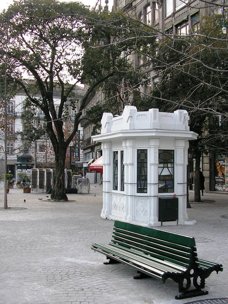 "STCP" historical kiosk in Porto, Portugal. Author: Manuel de Sousa.